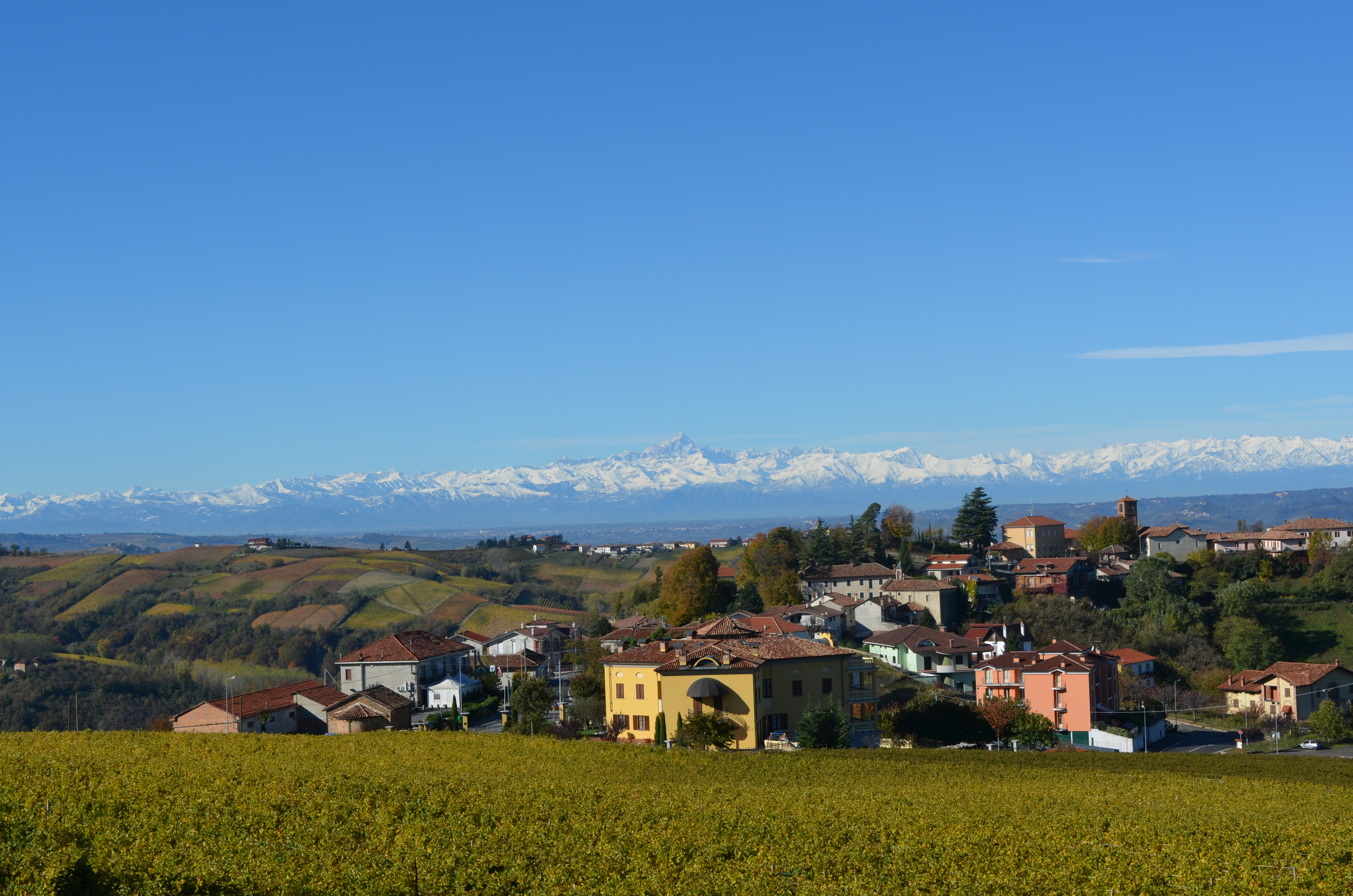 Paese di Neviglie